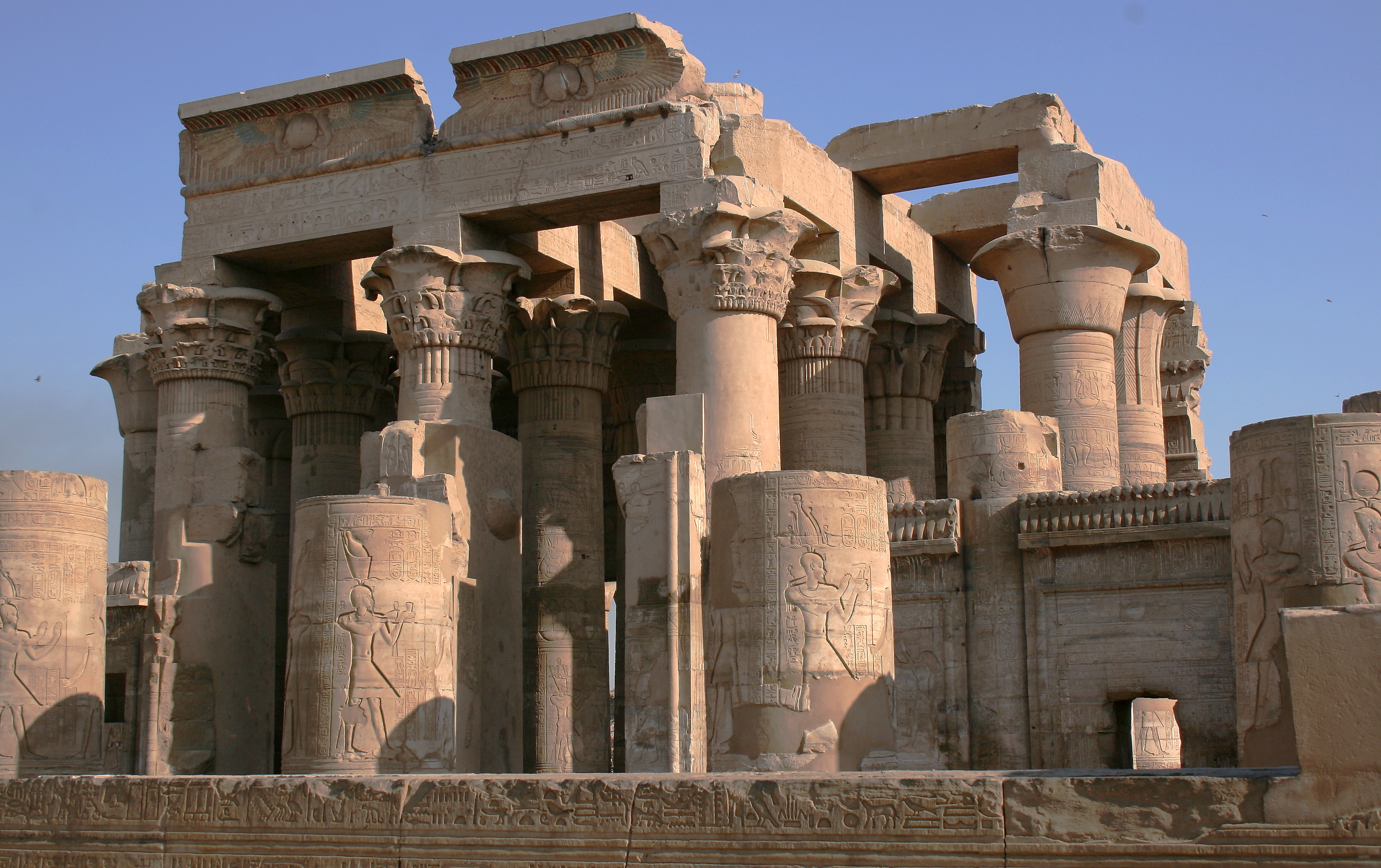 Tempel von Kom Ombo.